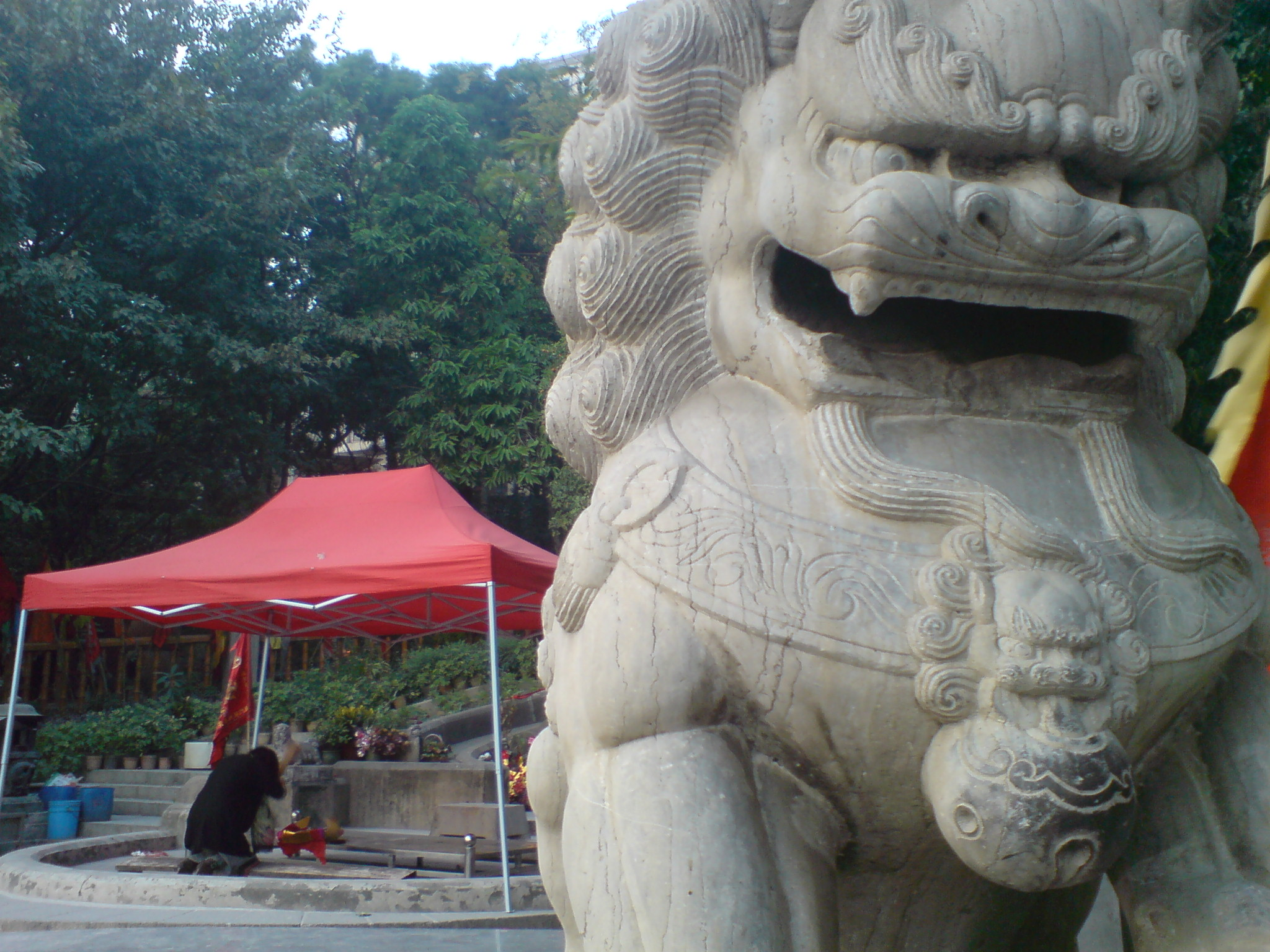 宋少帝陵的石獅